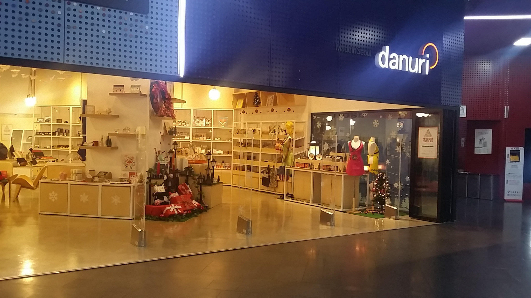 조선말: 서울 시민청 다누리가게